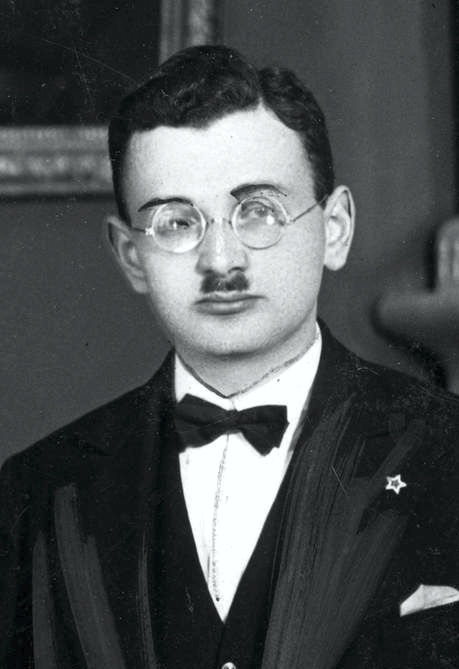 Isaj Dratwer (1905-1985), warszawski esperantysta i bakteriolog żydowskiego pochodzenia.